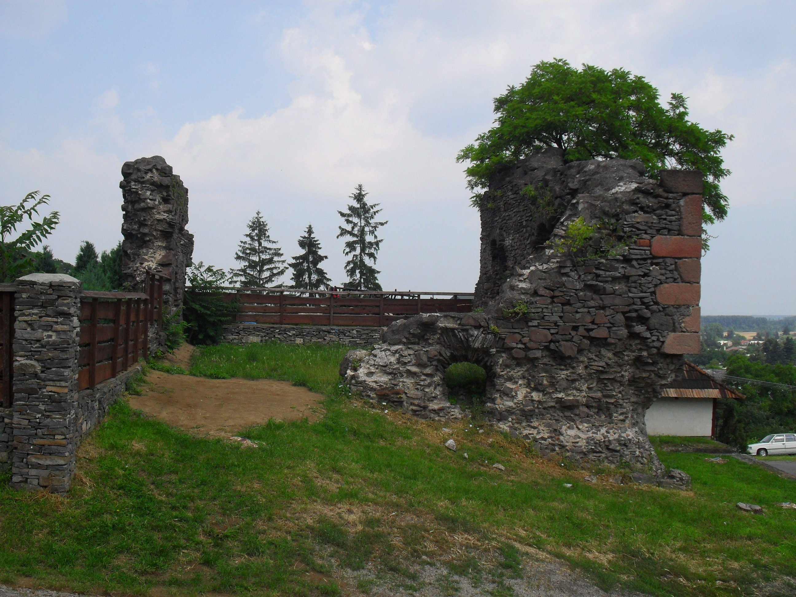 Királyhelmec - Csonkavár